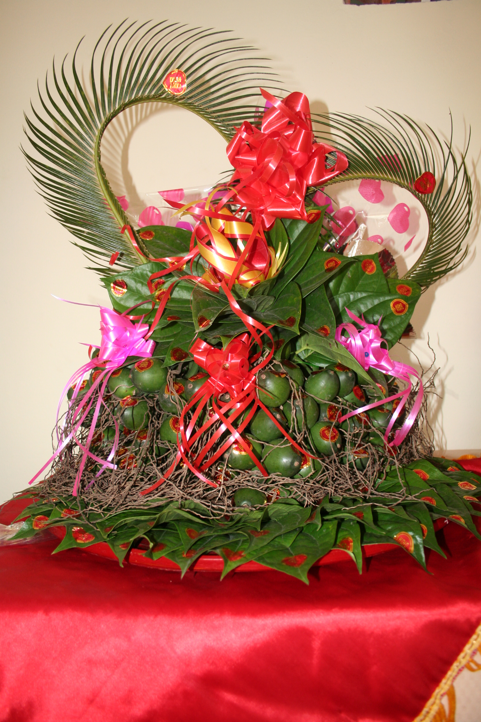 Buong cau trong le an hoi